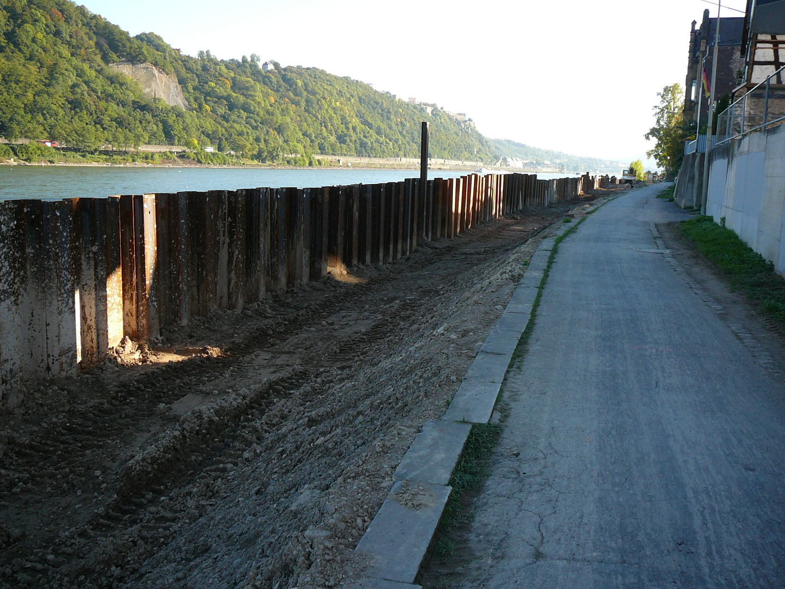 Hochwasserschutz Koblenz Neuendorf Blick in Richtung Festung Ehrenbreistein